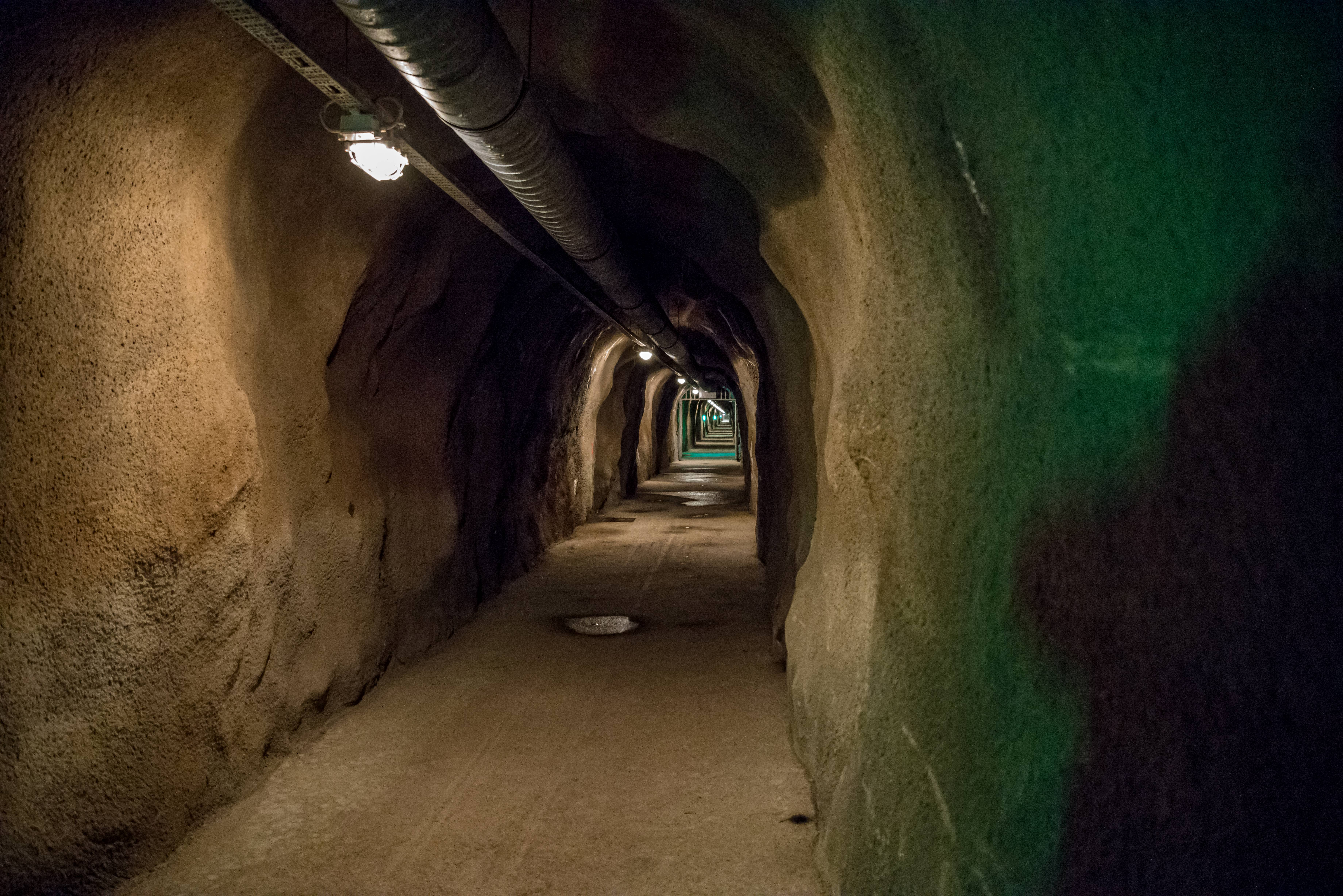 Der Barbarastollen ist der Zentrale Bergungsort der Bundesrepublik Deutschland zur Lagerung von fotografisch archivierten Dokumenten mit hoher national- oder kulturhistorischer Bedeutung. Er ist in Europa das größte Archiv zur Langzeitarchivierung. Die Bilder sind im Rahmen einer Führung des Bundesamts für Bevölkerungsschutz und Katastrophenhilfe (BBK) entstanden - Wikipedia Stammtisch,das 113. Treffen am 30. Mai 2016 Der Zugang tu den Lagerstollen, kurz nach dem Eingang zum Stollen